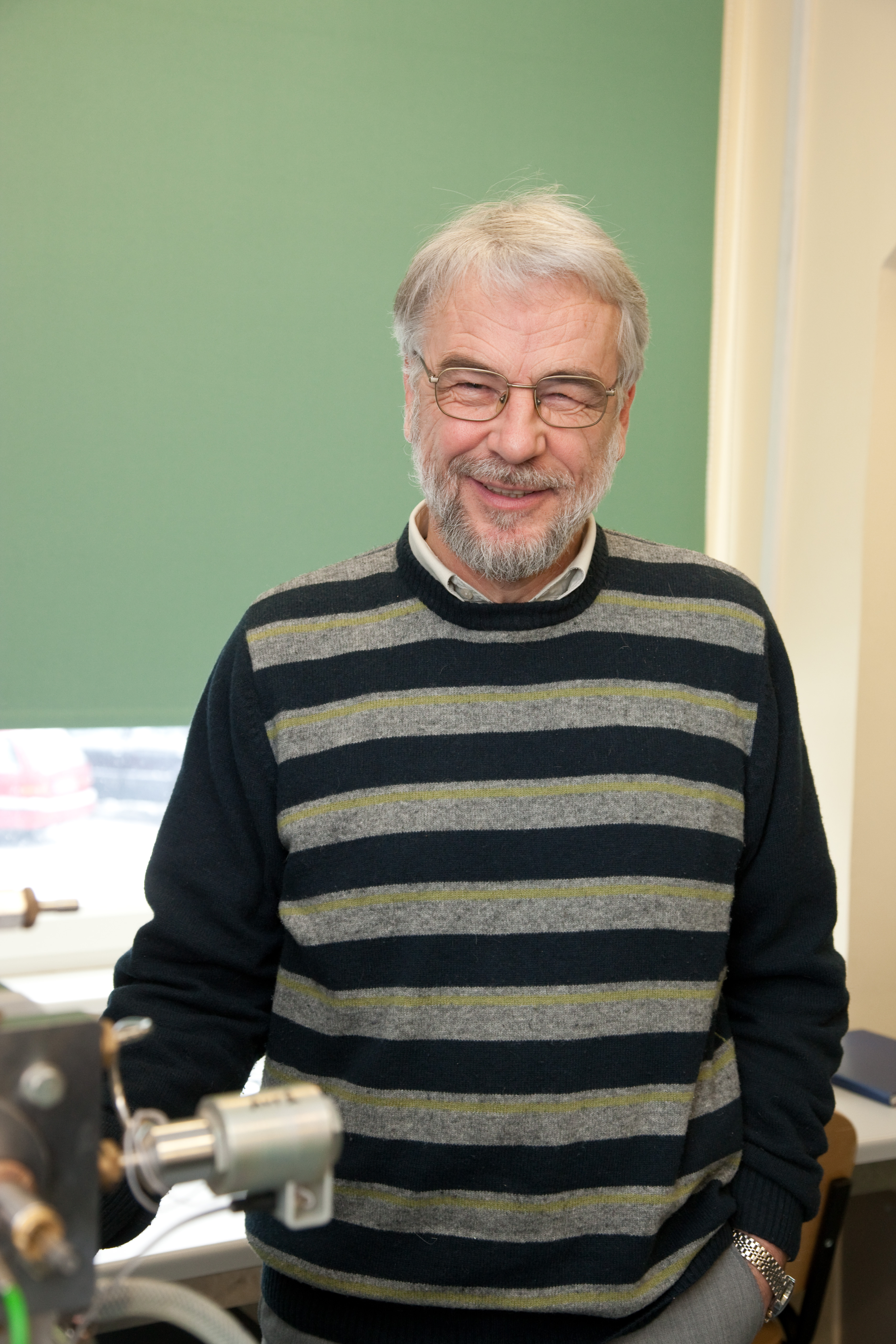 Tartu Ülikooli füüsika instituudi kiletehnoloogia labor. Kiletehnoloogia labori juhataja Jaan Aarik.